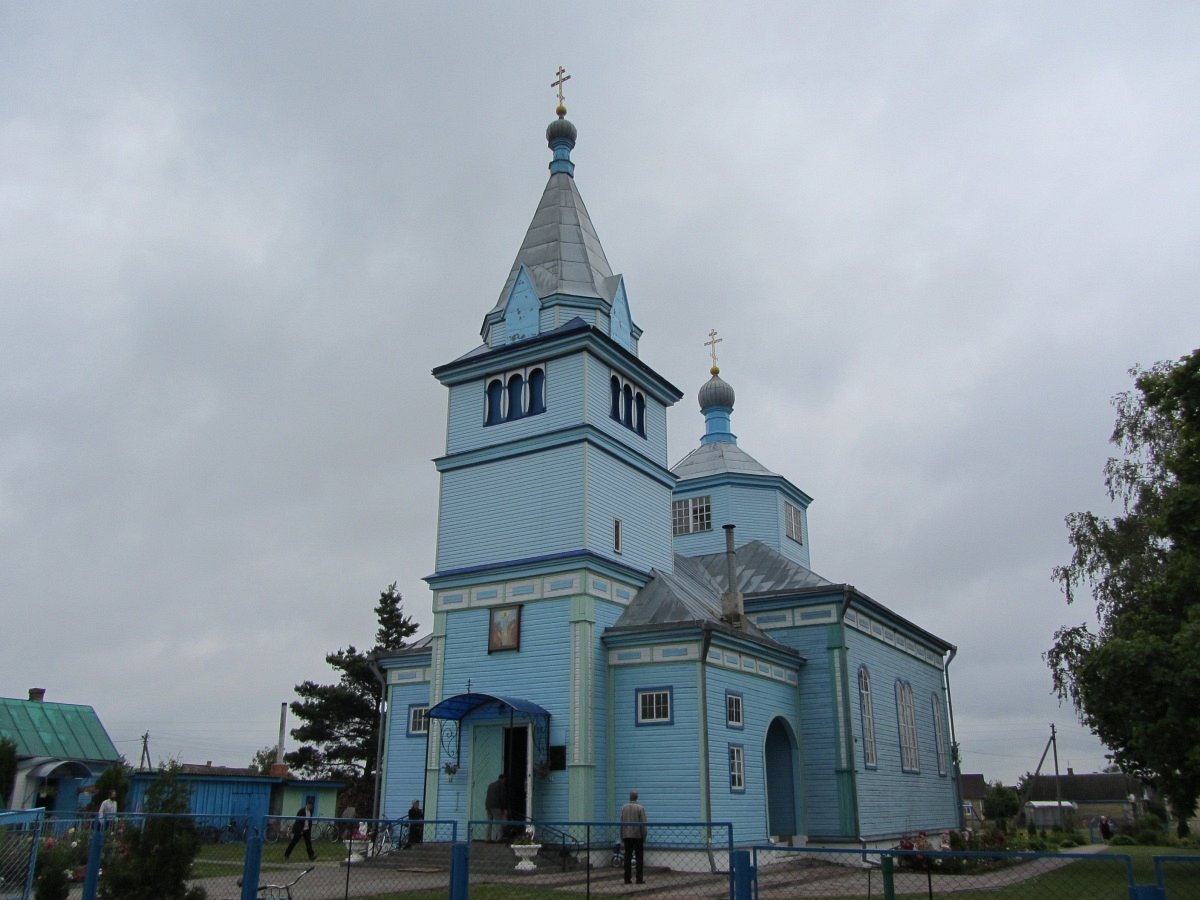 Столін. Царква